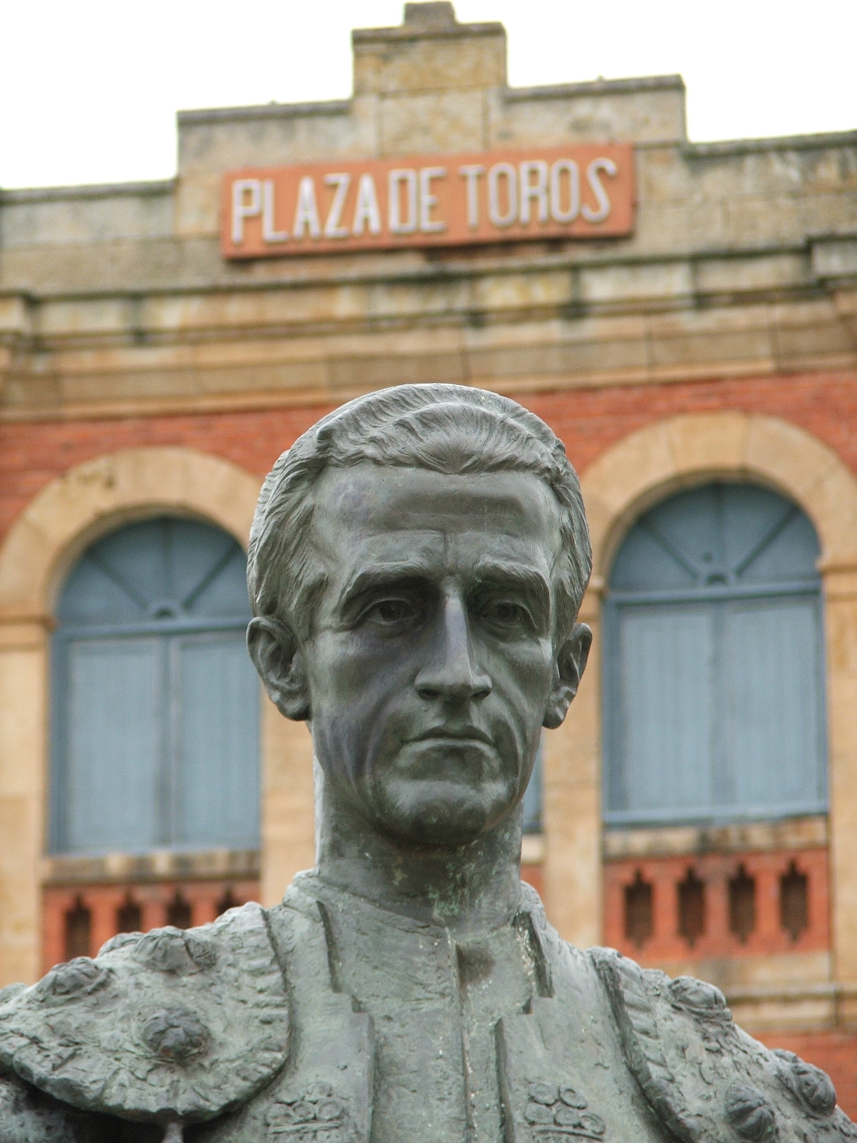 / El Viti, escultura en la plaza de toros de Salamanca, España.